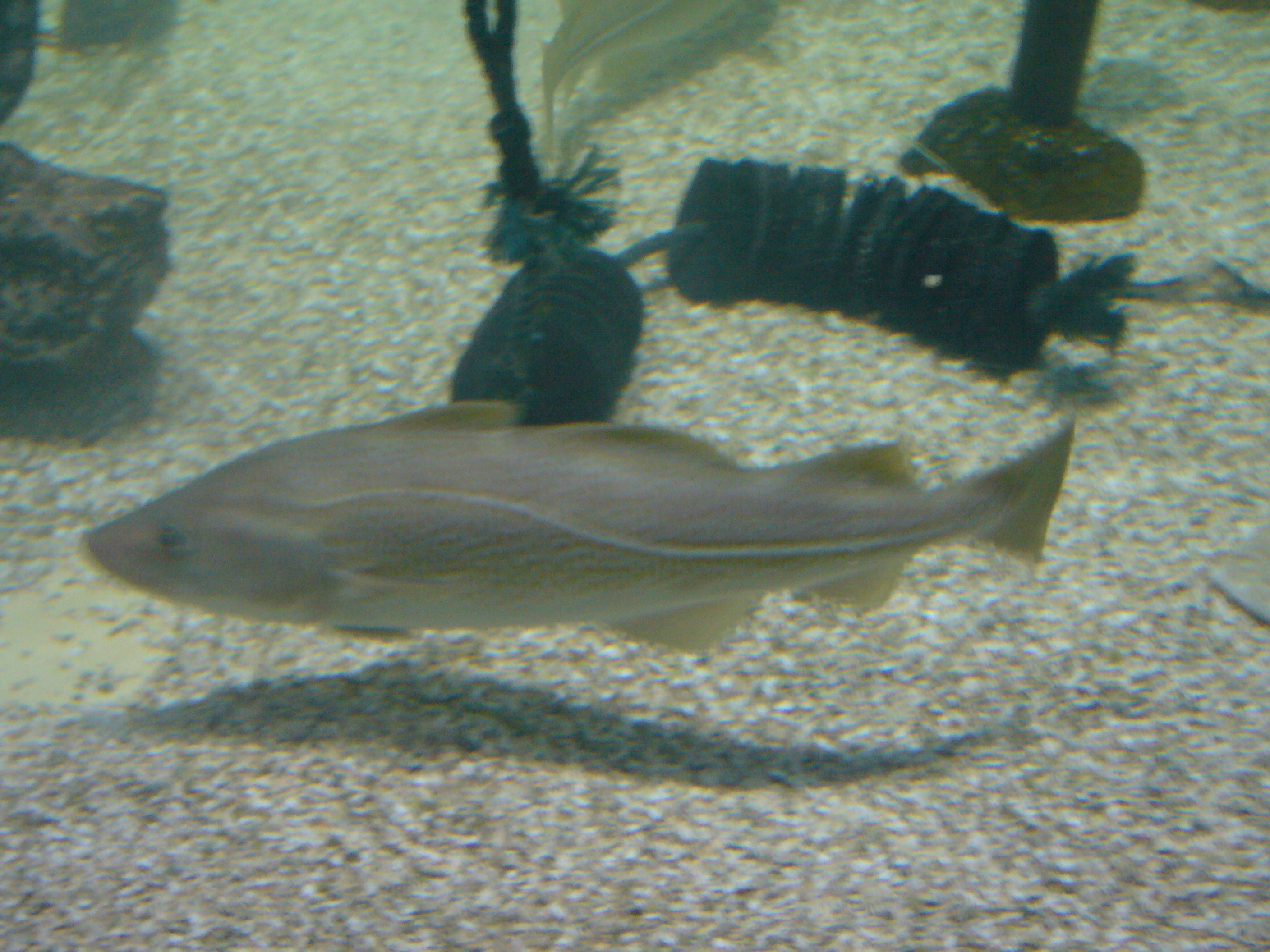 Gadus morhua (Dorsch, Kabeljau)